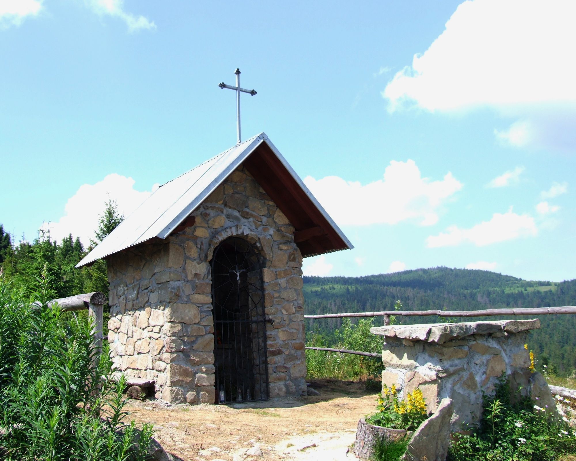 Kapliczka na Jaworzynce Gorcowskiej (Piorunowcu)